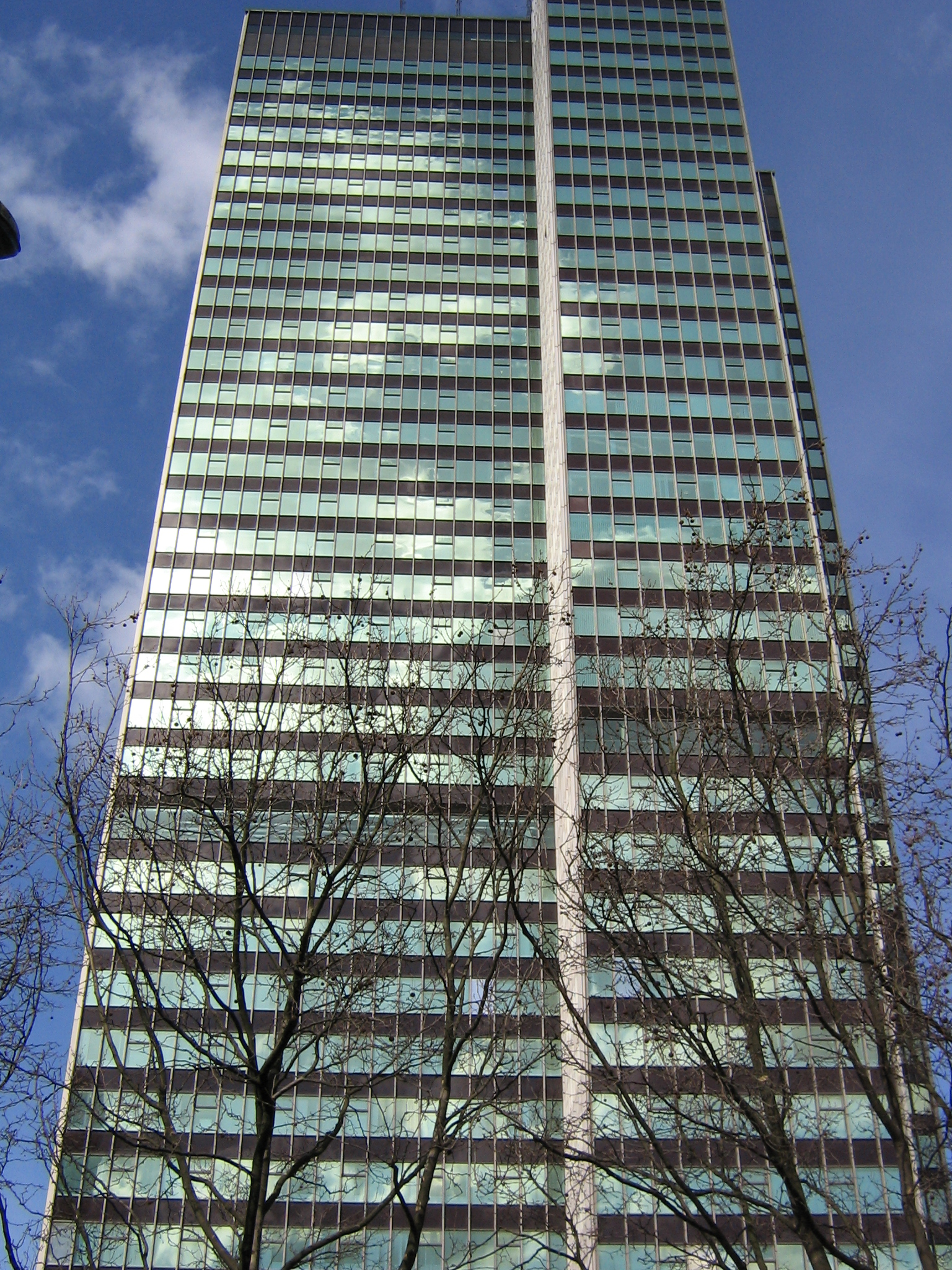 Edificio de oficinas en Euston Road, en la ciudad de Londres.